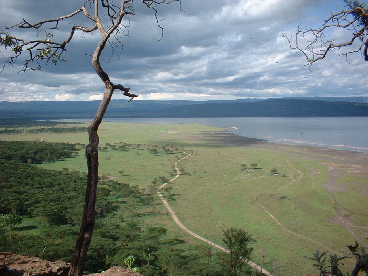 Uizicht over Lake Nakuru. Foto gemaakt door mij in Mei 2003.